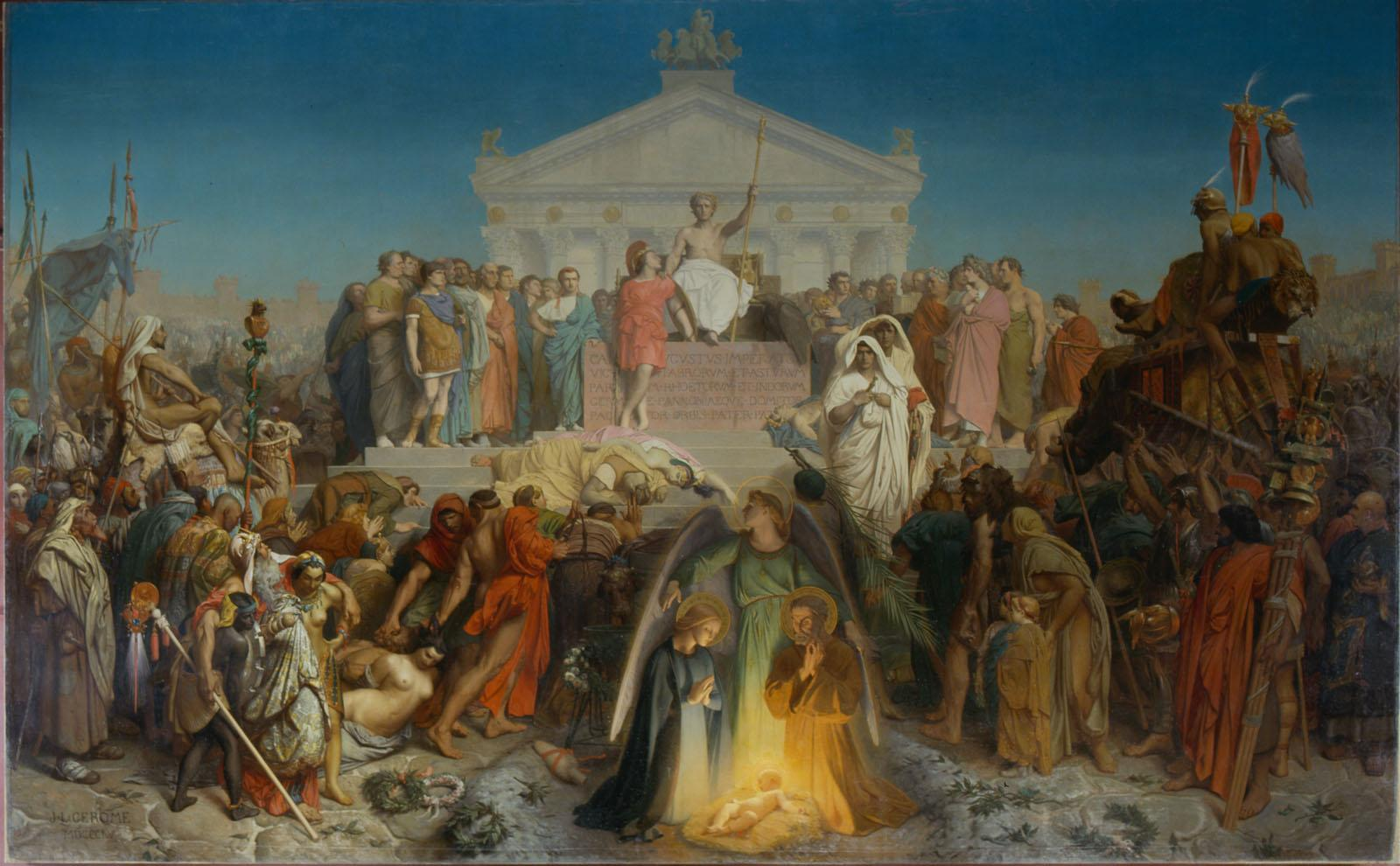 Le Siècle d'Auguste - naissance de N.S. Jésus-Christ par Gérôme